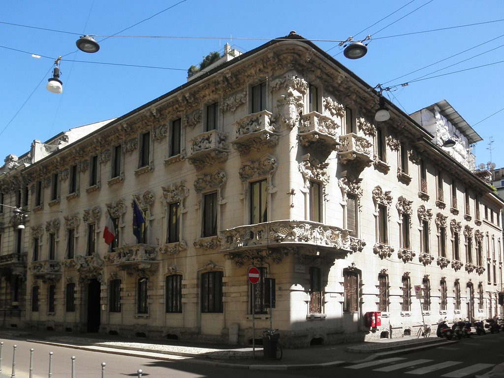 Edificio per abitazioni in corso Monforte 32 angolo via Conservatorio a Milano, costruito nel 1911 su progetto di Alfredo Campanini